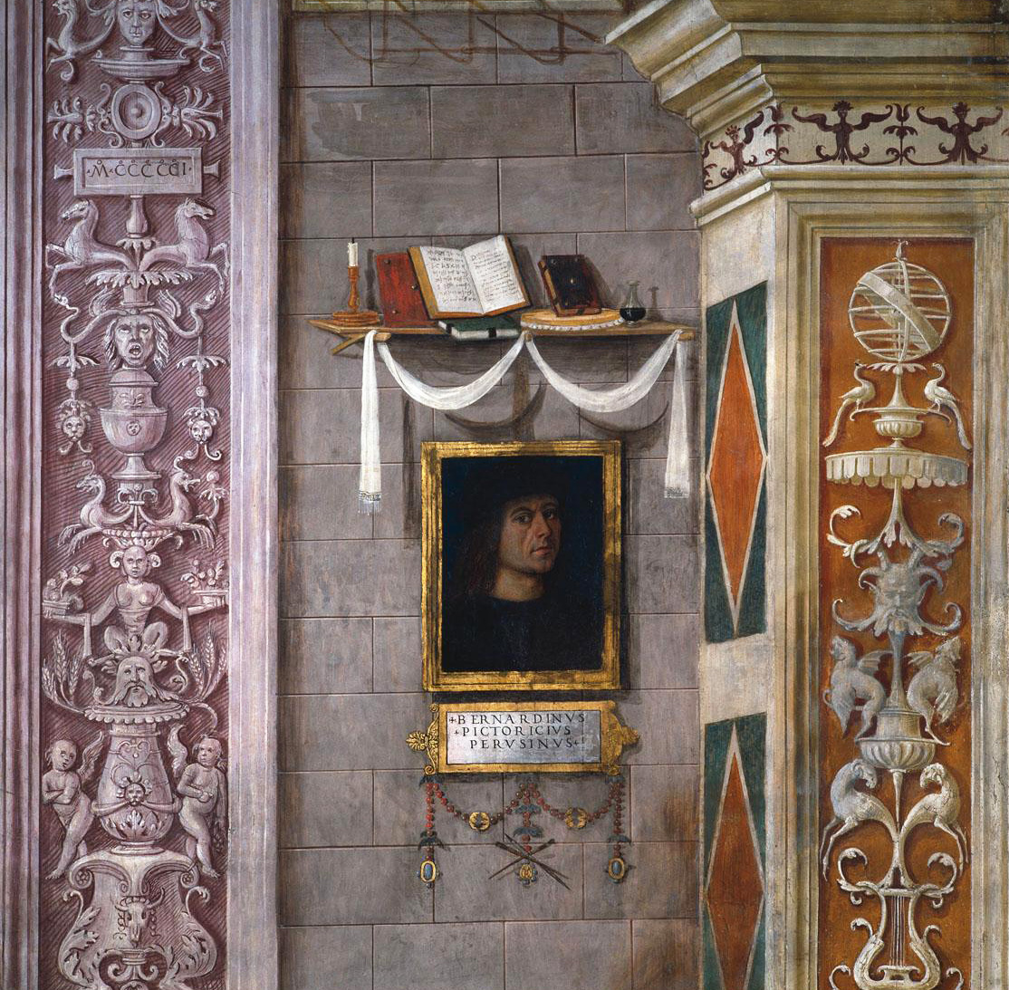 Autorretrato Pinturicchio, en los frescos de la Capilla Baglione, Collegiata Santa Maria Maggiore, Spello